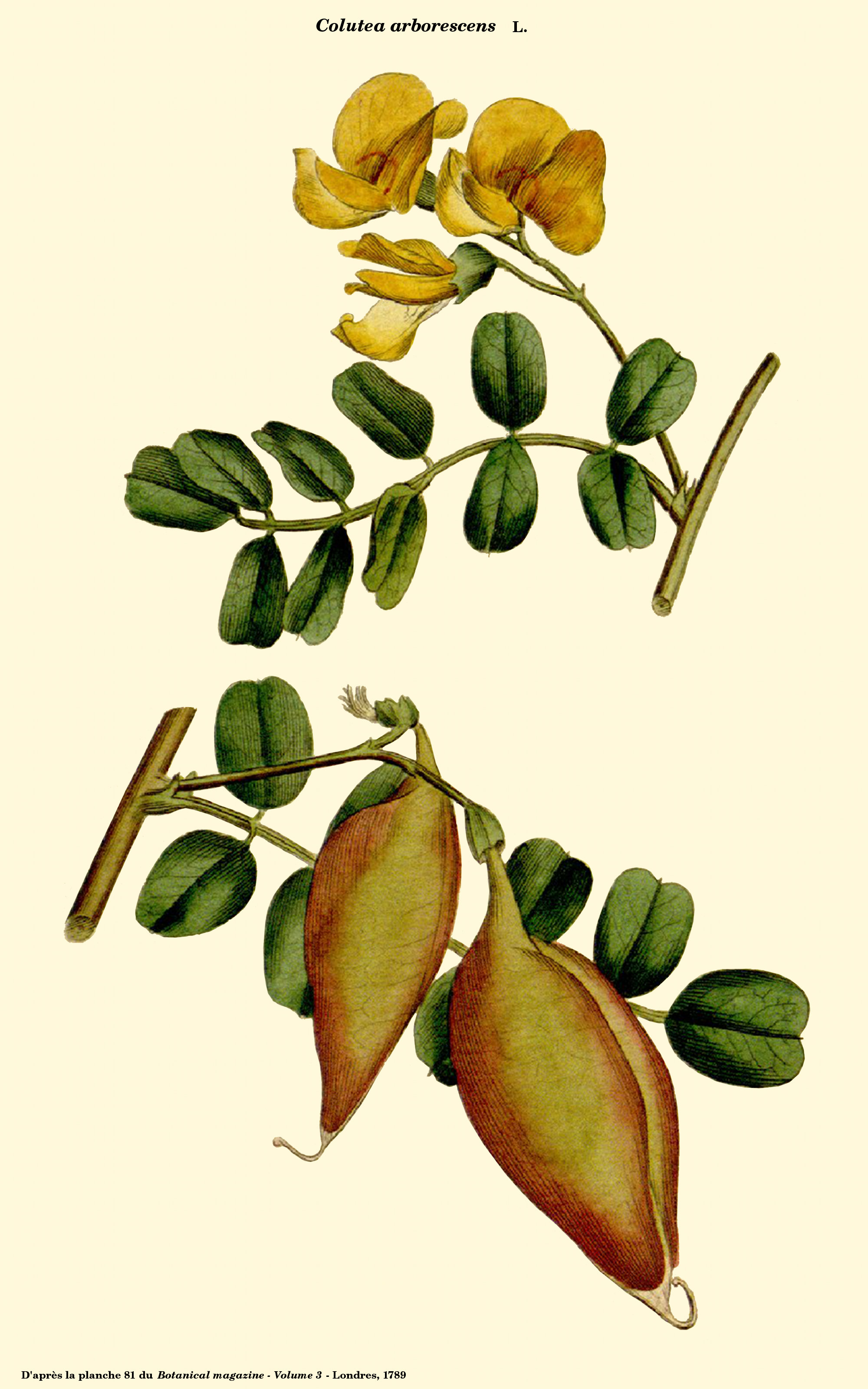 Planche 81 du Botanical magazine volume 3 - Londres, 1789 - Planche reprise sous Gimp par D. Prévôt